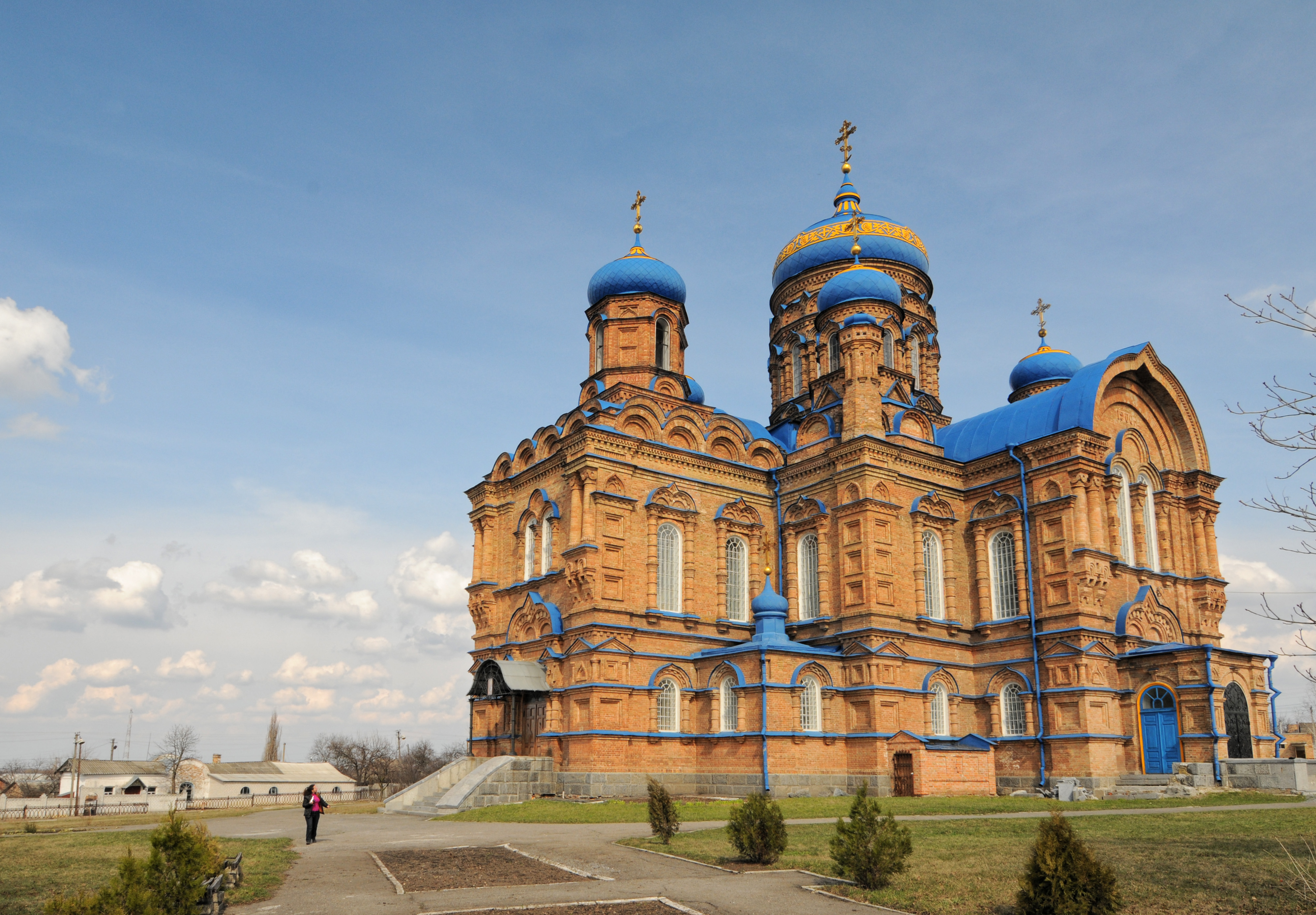 Козельщина, собор Різдва Богородиці